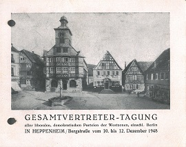 Einladungskarte zum Gründungsparteitag der FDP am 11. und 12. Dezember 1948 in Heppenheim an der Bergstraße